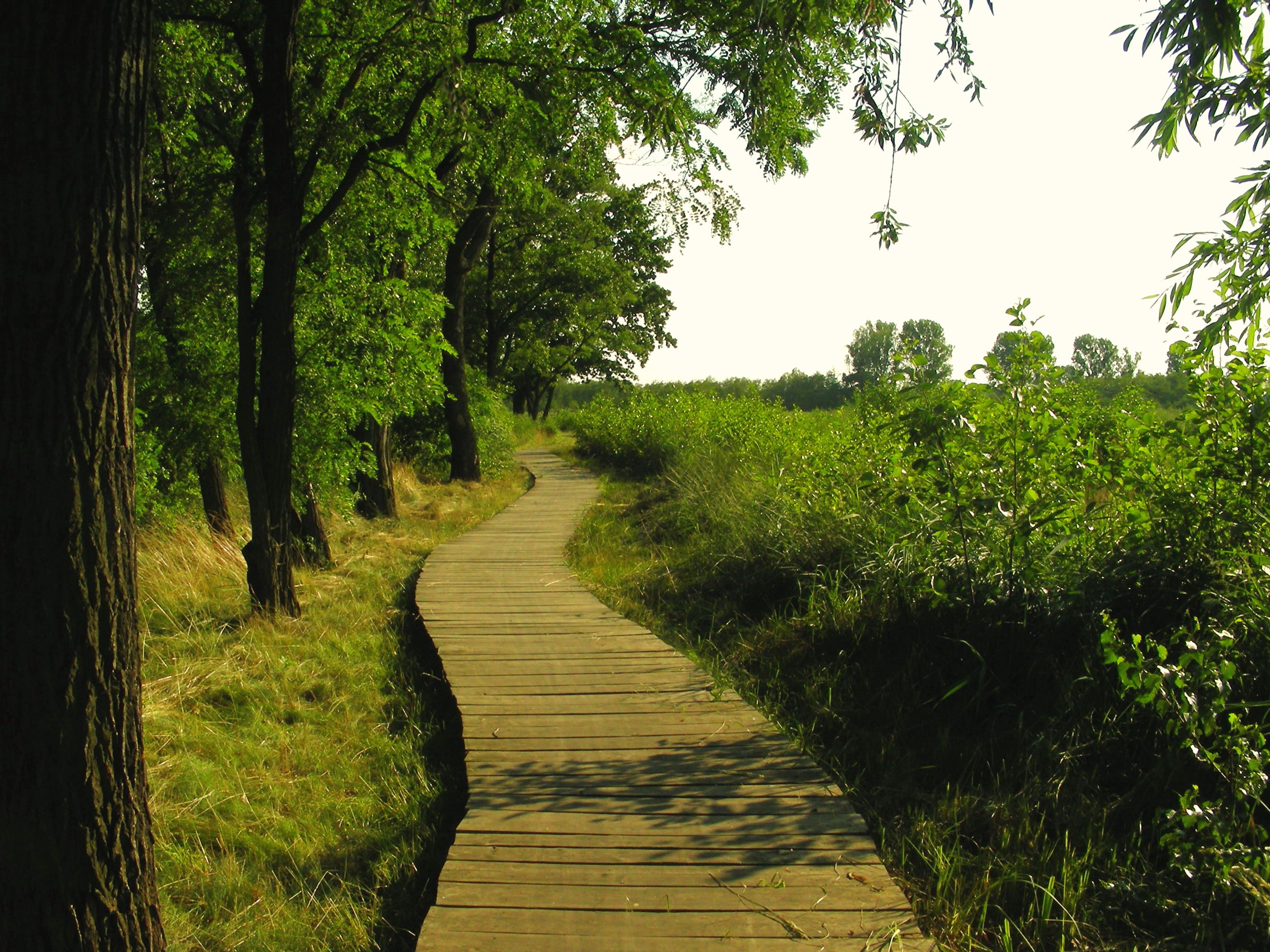 Rezerwat przyrody Staw Nowokuźnicki, gmina Prószków, województwo Opolskie, Polska